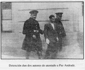 Detención dun dos autores do atentado a Paz Andrade.